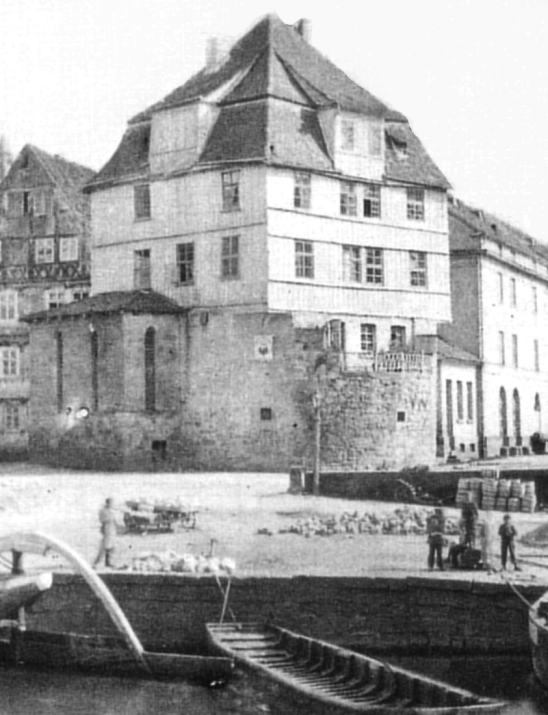 Schlagdspitze mit Altes Sydekum